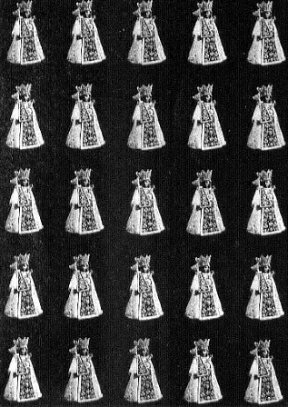 Schluckbildchenbogen mit Gnadenbild von Altötting. Klischeedruck. Größe der Einzelbilder 20×15 mm.